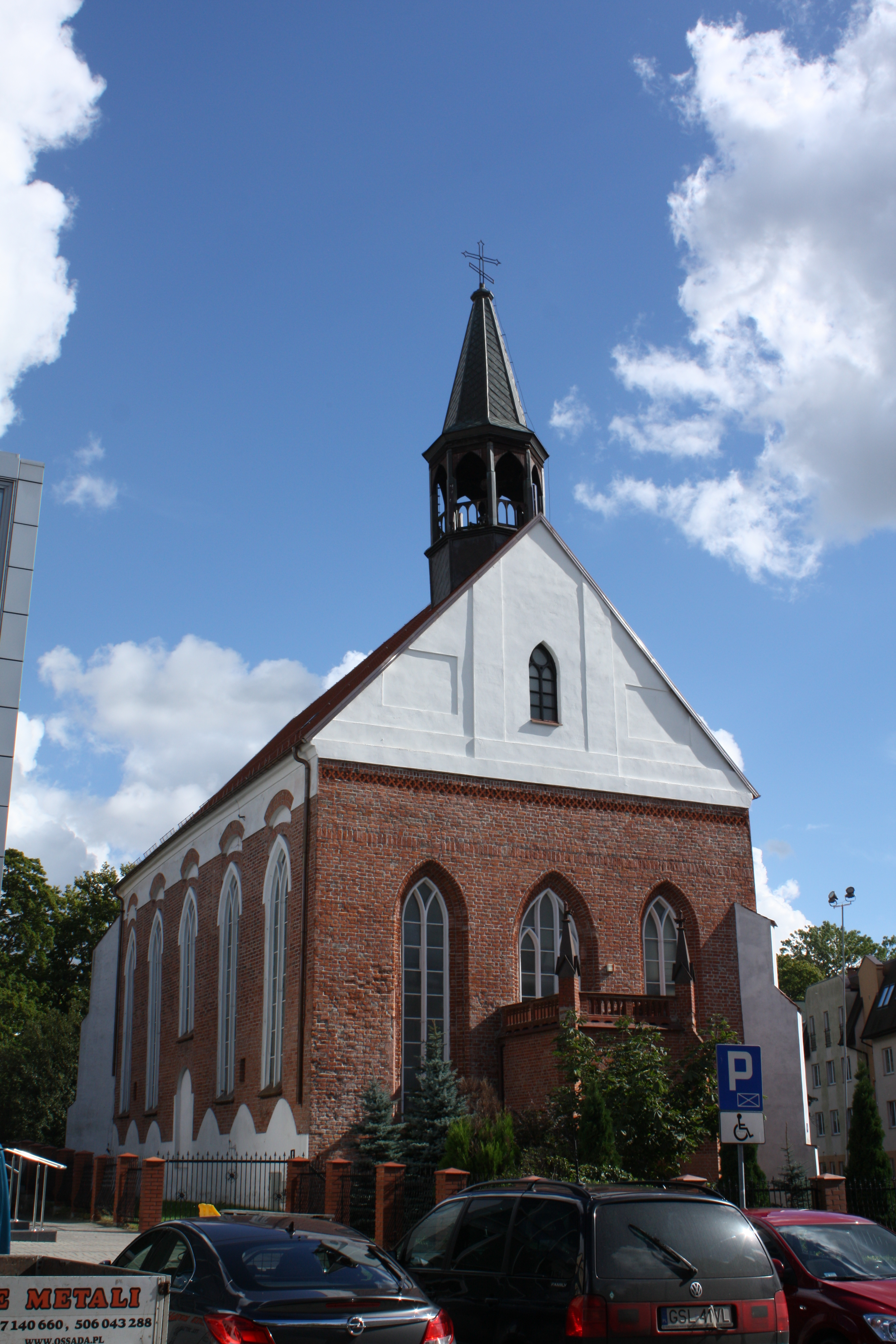 Kaplica zamkowa, ob. cerkiew prawosławna. par. p.w. Zaśnięcia Najświętszej Bogurodzicy przy ul. Mickiewicza / Grodzka / Asnyka w Koszalinie